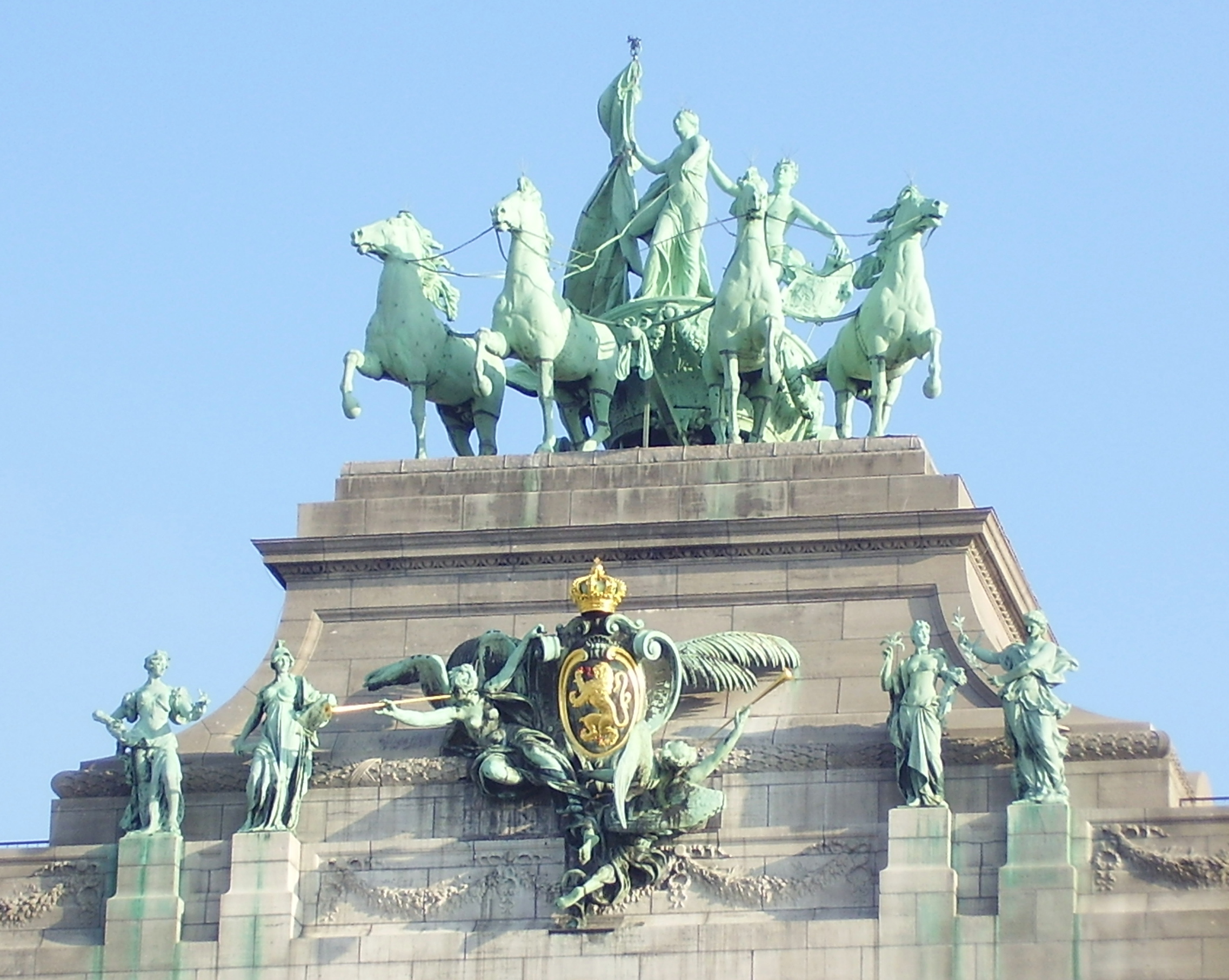 Arcades du Cinquantenaire, Bruxelles - Quadrige "Brabant élevant le drapeau national" Thomas Vinçotte et Jules Lagae, 1905